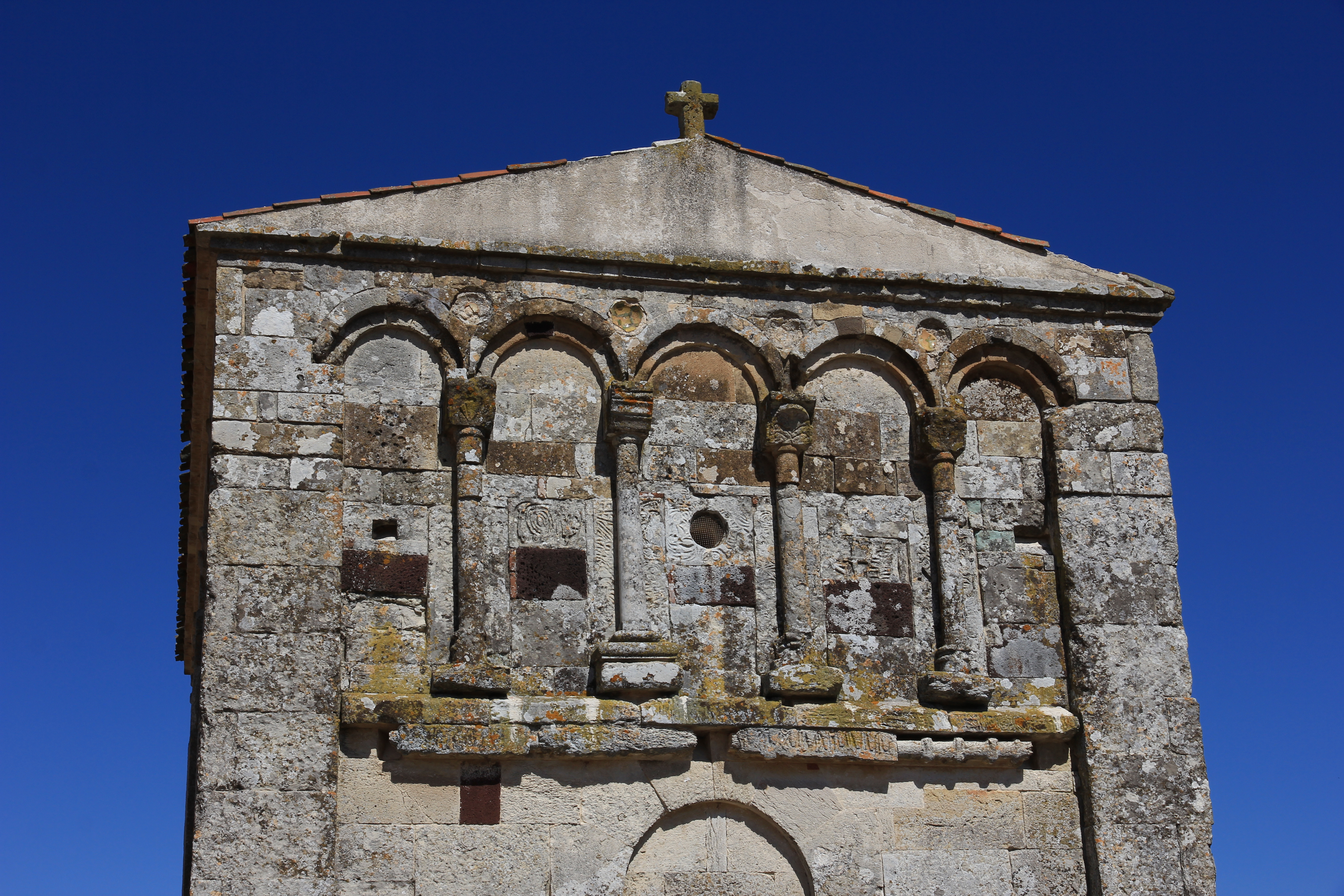 Chiesa di San Nicola di Trullas